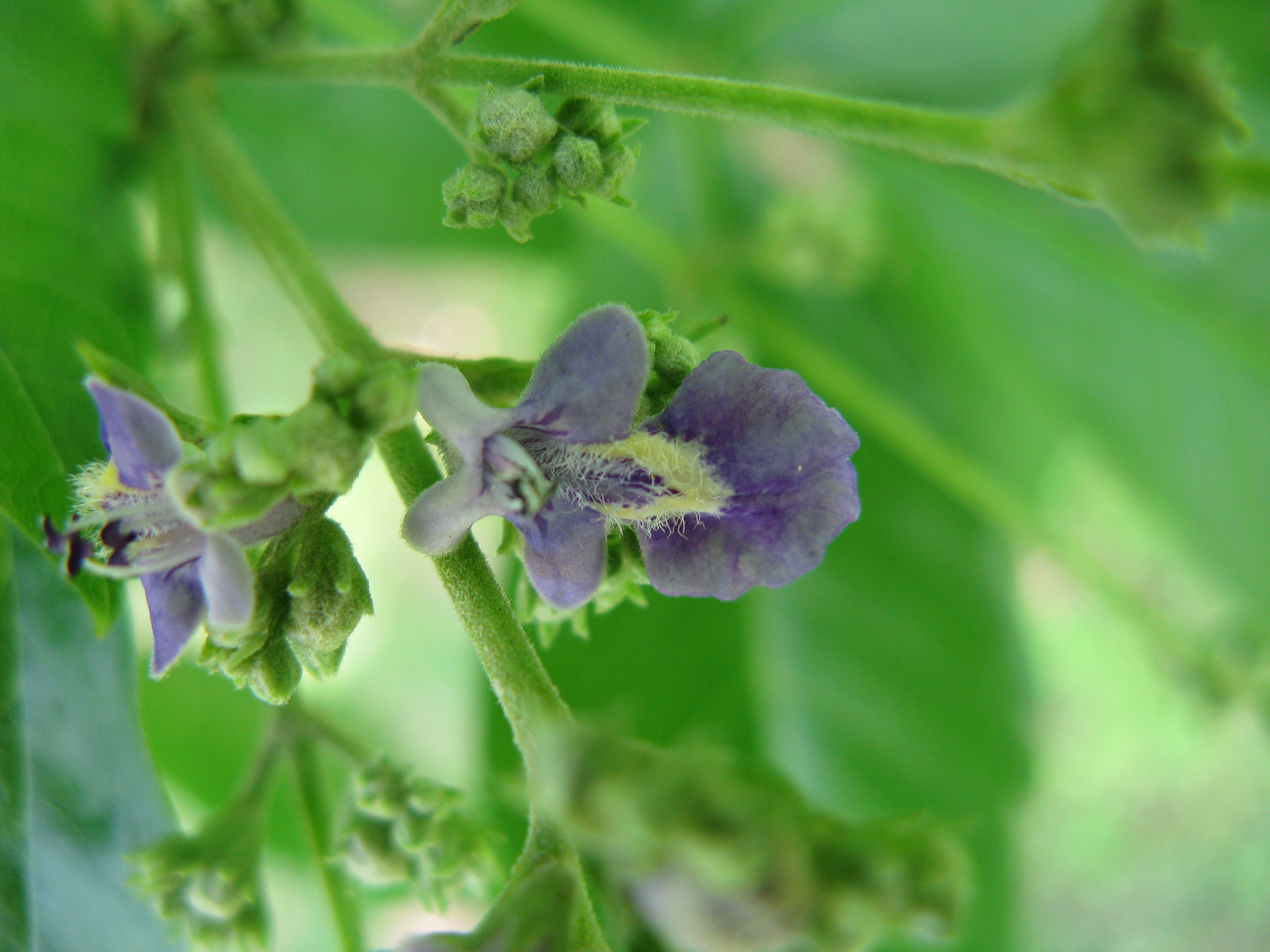 Scientific name Vitex cannabifolia